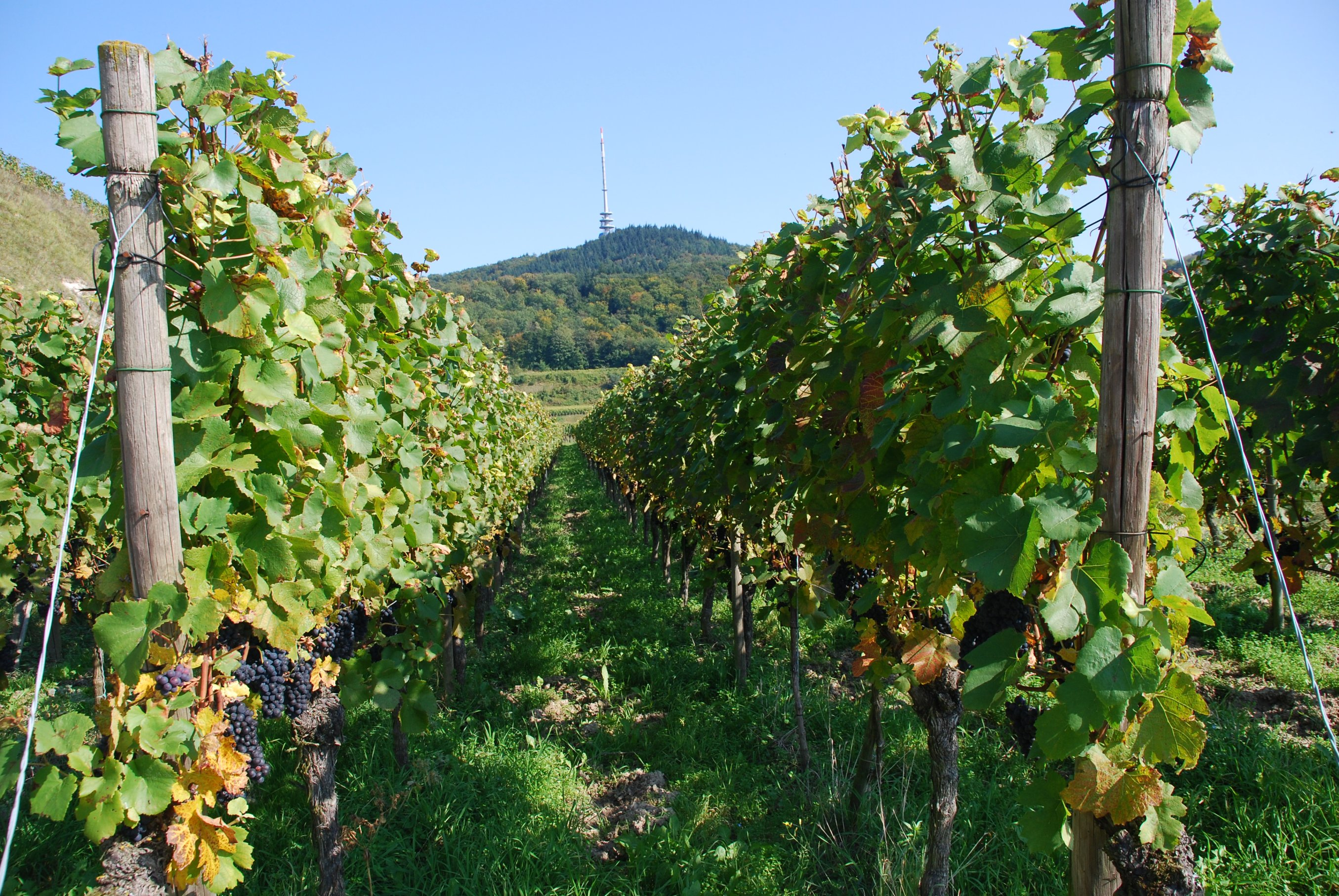 Weinreben im Kaiserstuhl, im Hintergrund der Totenkopf